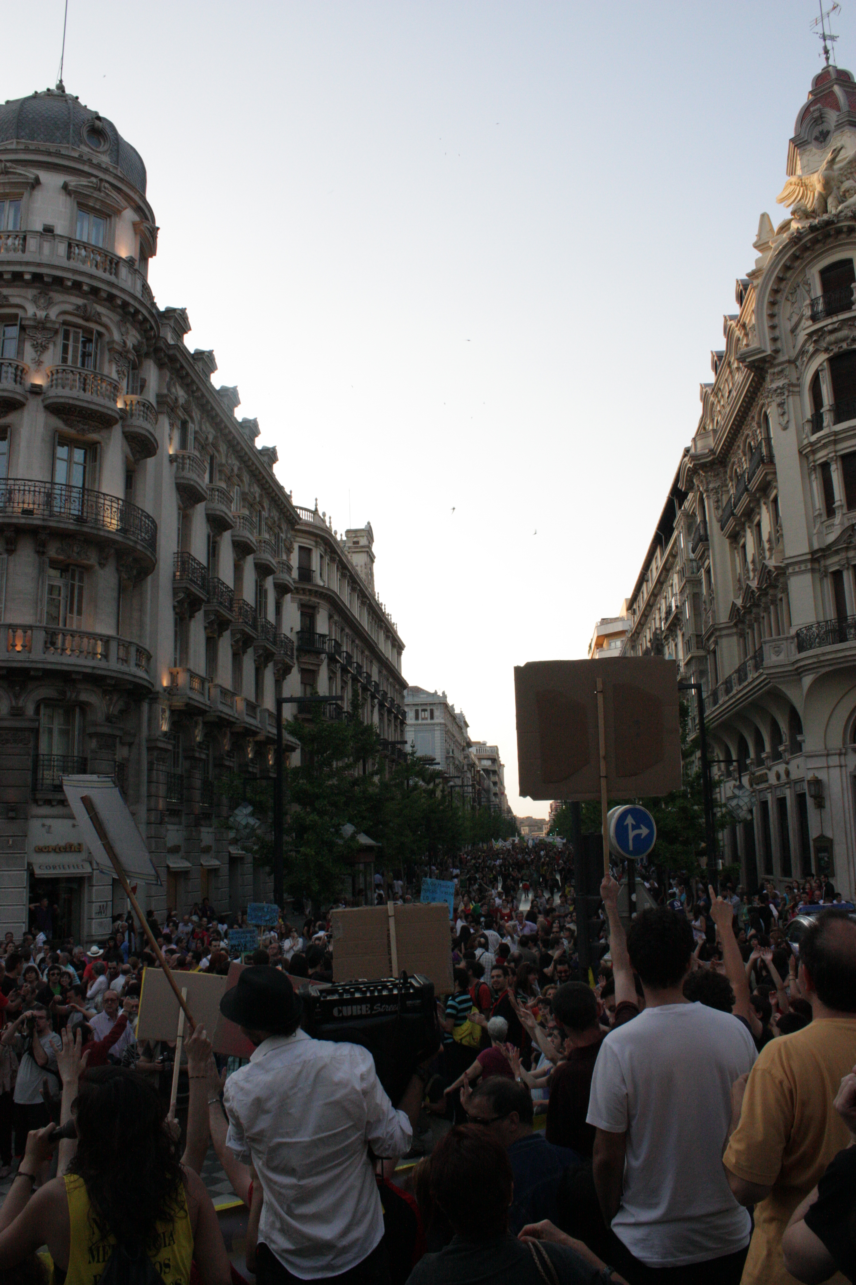 La Gran Vía de Colón, en Granada, abarrotada debido a las manifestaciones del 15 de mayo de 2011 en España.